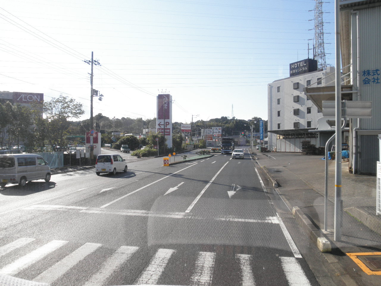 和歌山県新宮市橋本2丁目 国道42号